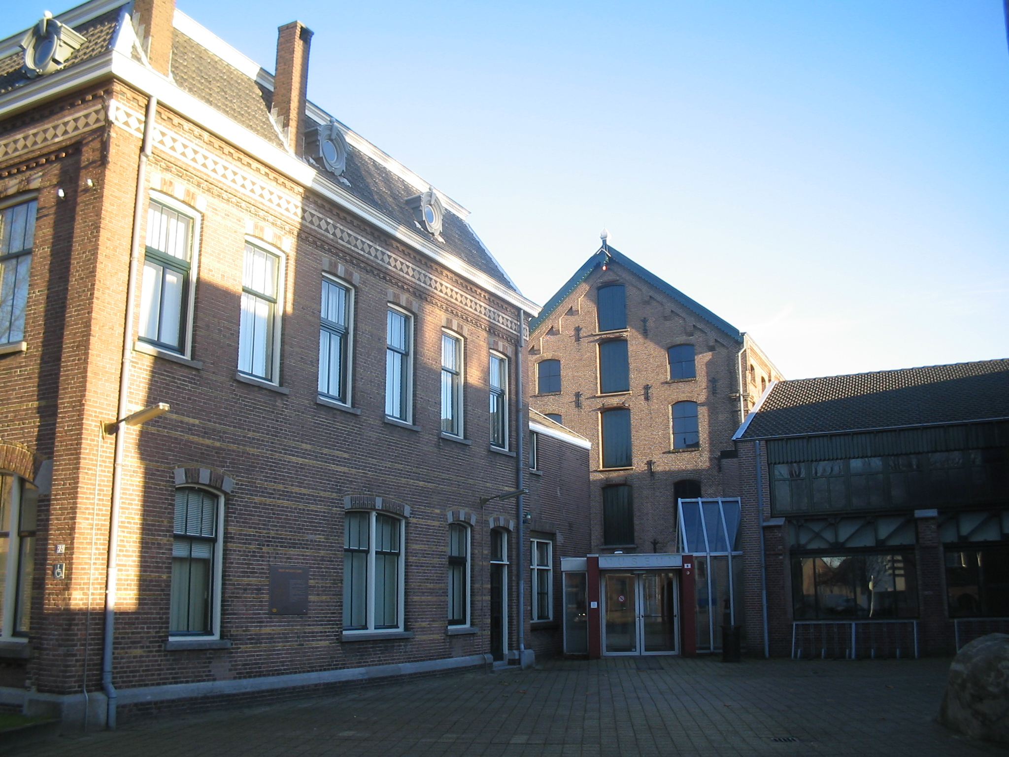 Tilburg, textielmuseum